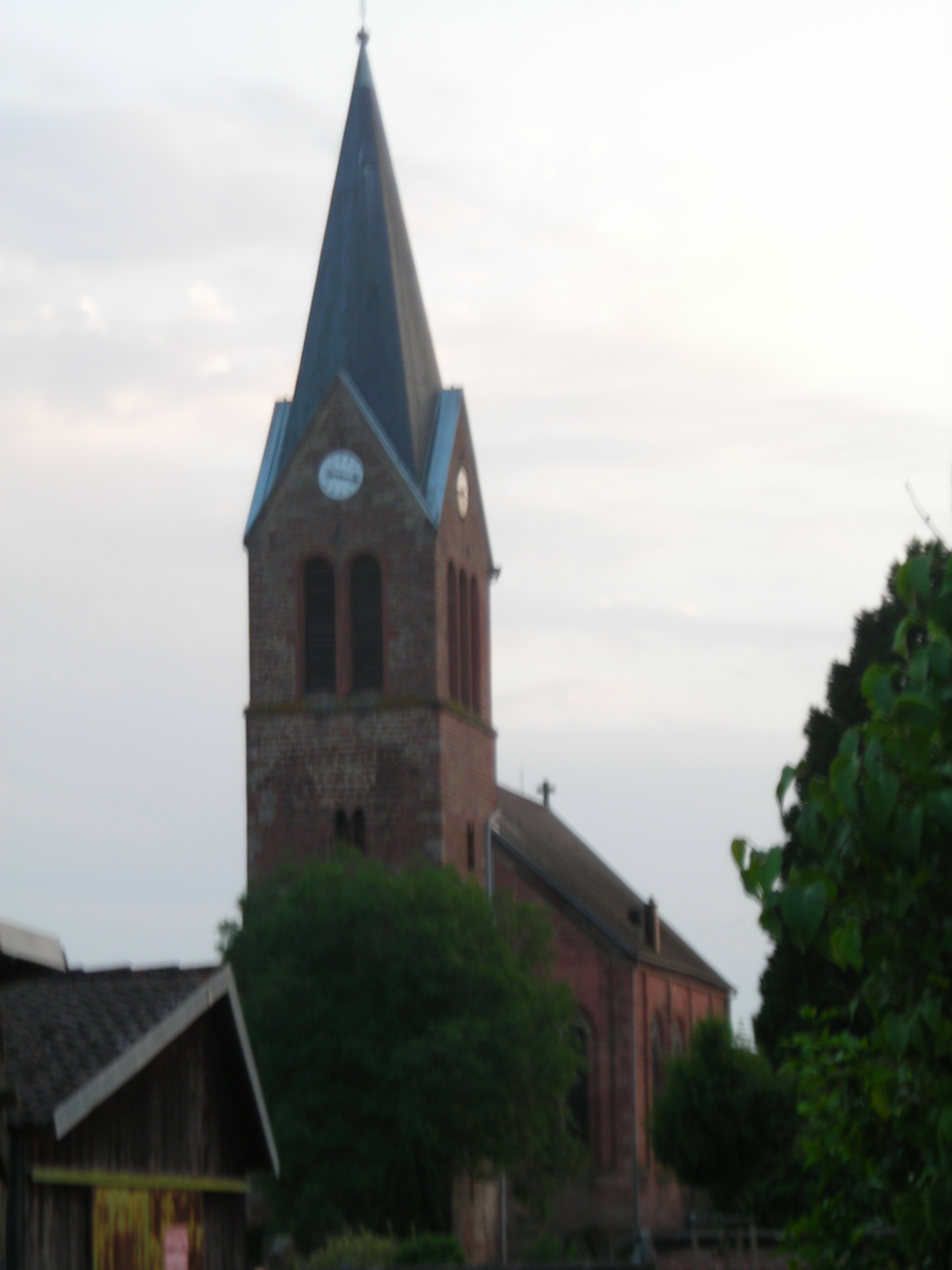 L'église du village vue depuis l'arrière du cimetière